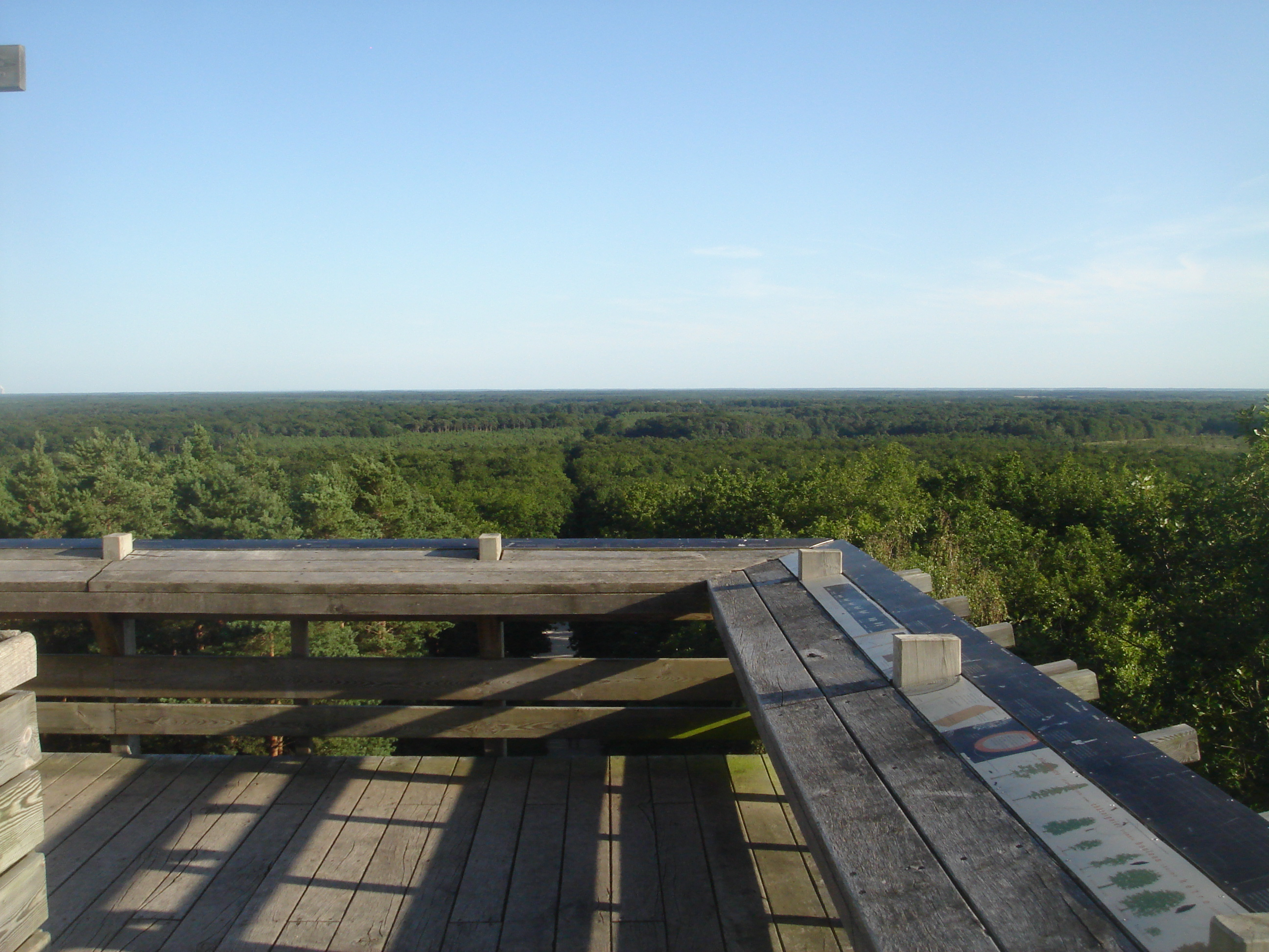 La forêt d'Orléans depuis l'observatoire des Caillettes, Nibelle, Loiret, France